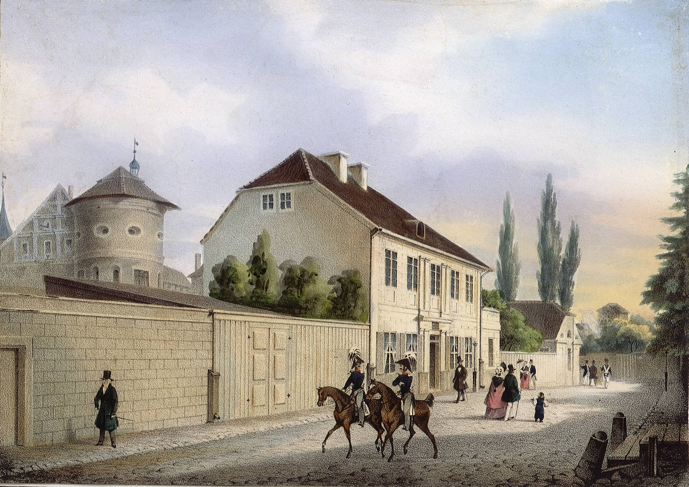 Kants Wohnhaus